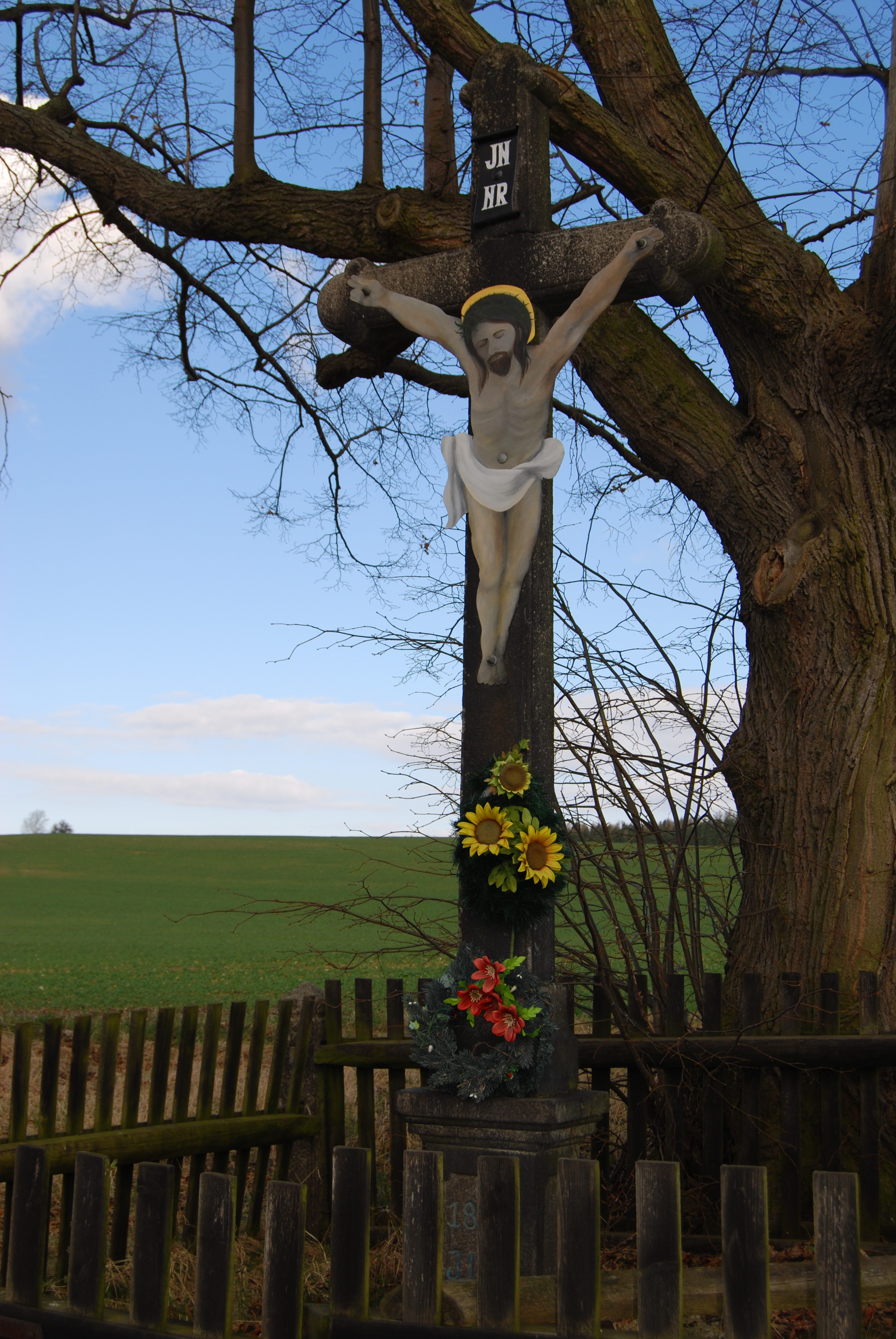 Detail kříže v ohrádce u komunikace z Kamýku na Příbram. Obec Jablonná se nachází v okrese Příbram, kraj Středočeský. Česká republika.